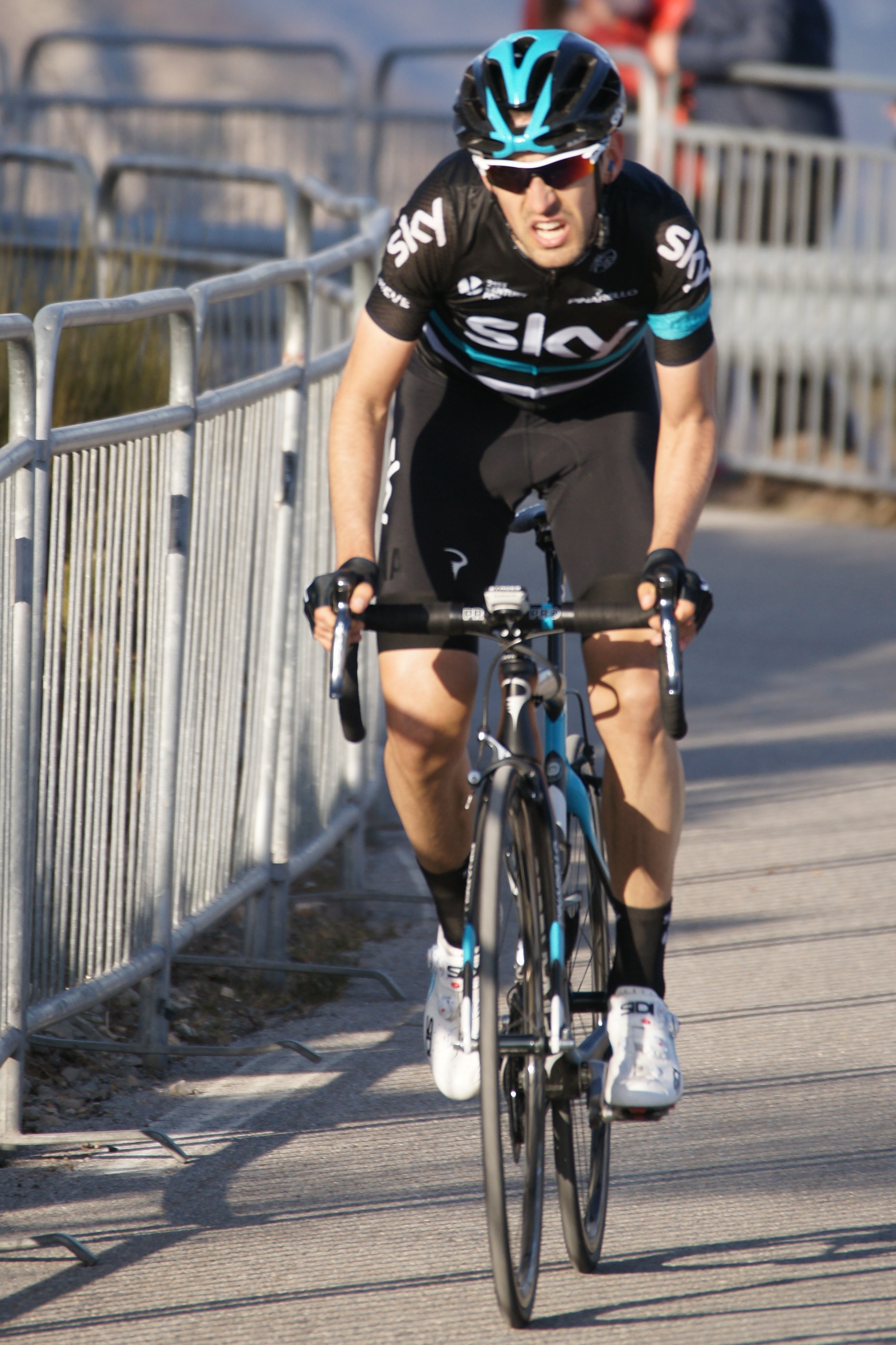 Mikel Nieve Madone d'Utelle 2016 Depicted person: Mikel Nieve Depicted team: Sky